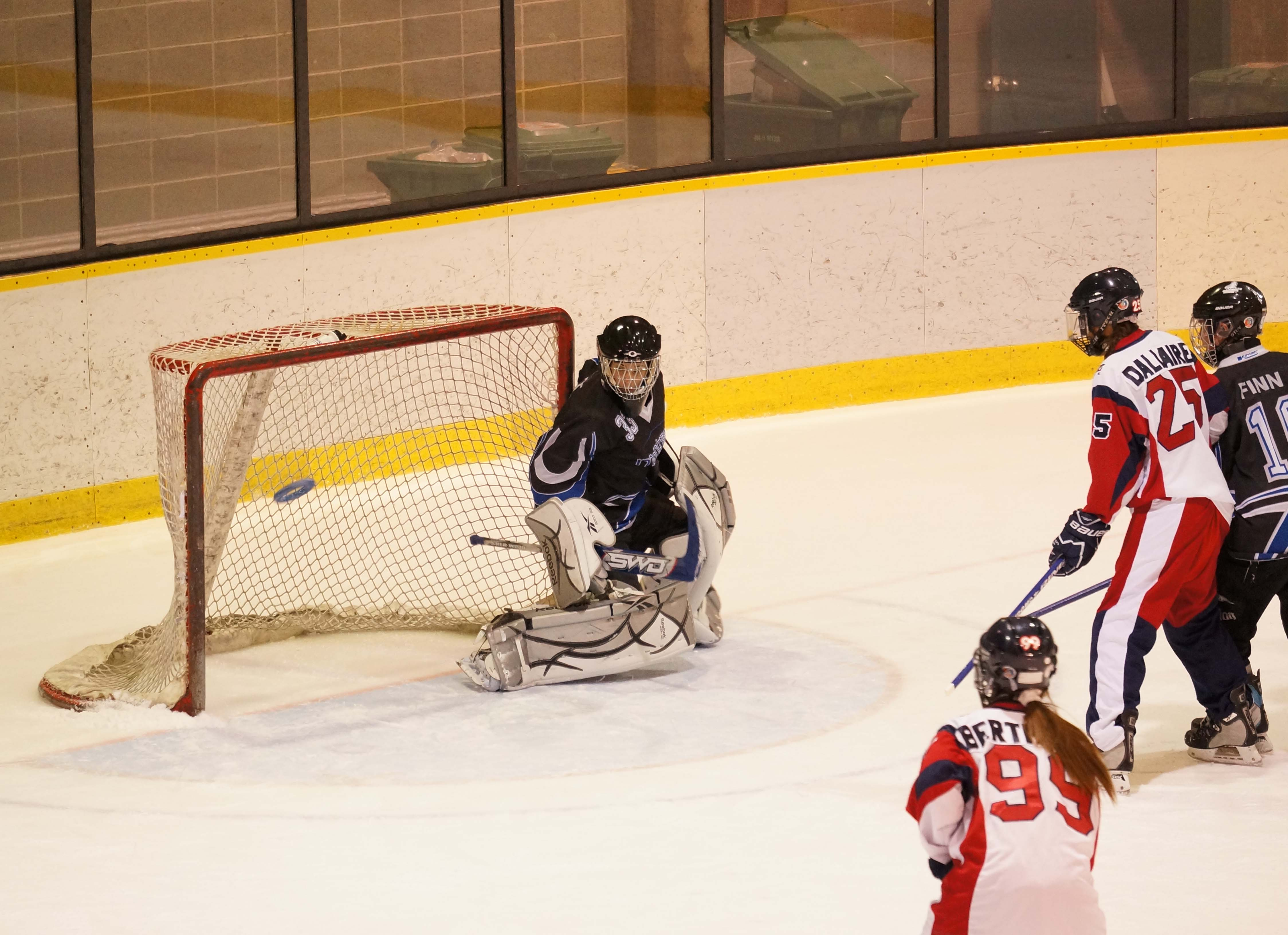 Ringuette